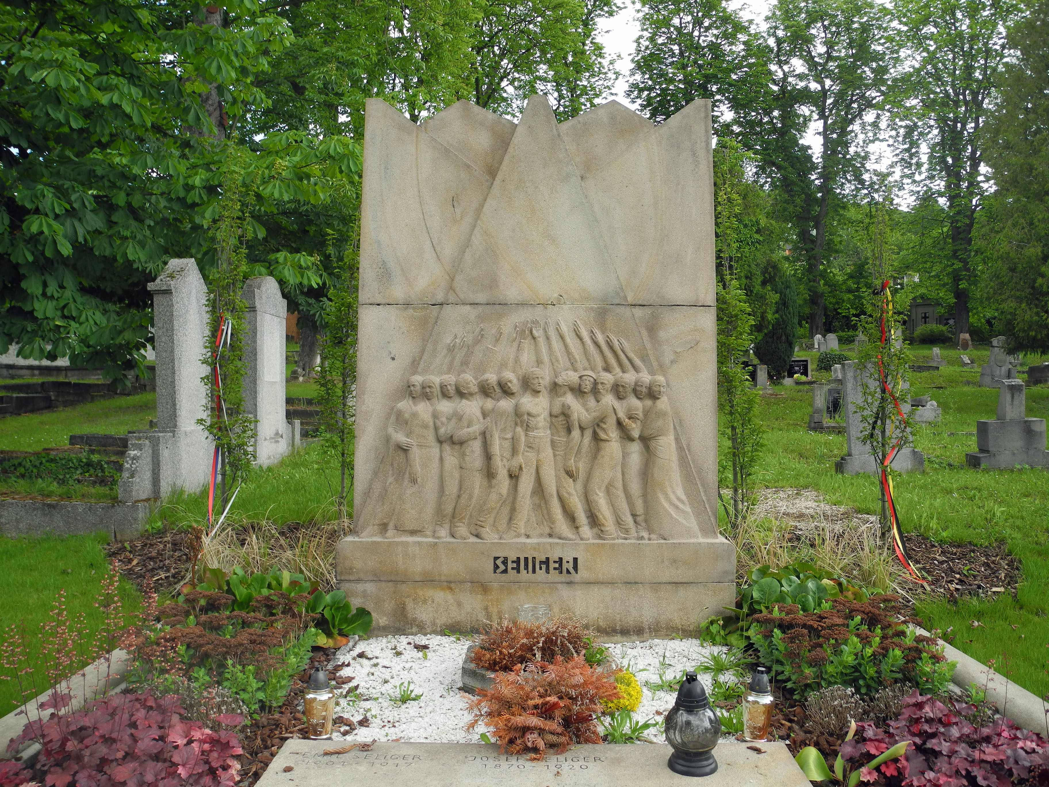 Grabstätte Josef Seliger (1870–1920) – Vorsitzender der Deutschen sozialdemokratischen Arbeiterpartei (DSAP) – auf dem alten Schönauer Friedhof in Bystřany, U Hřbitova, mit dem Grabmal von Johannes Watzal – ein Sandsteinblock mit 5 Spitzen, die die 5 Erdteile der Internationale verkörpern